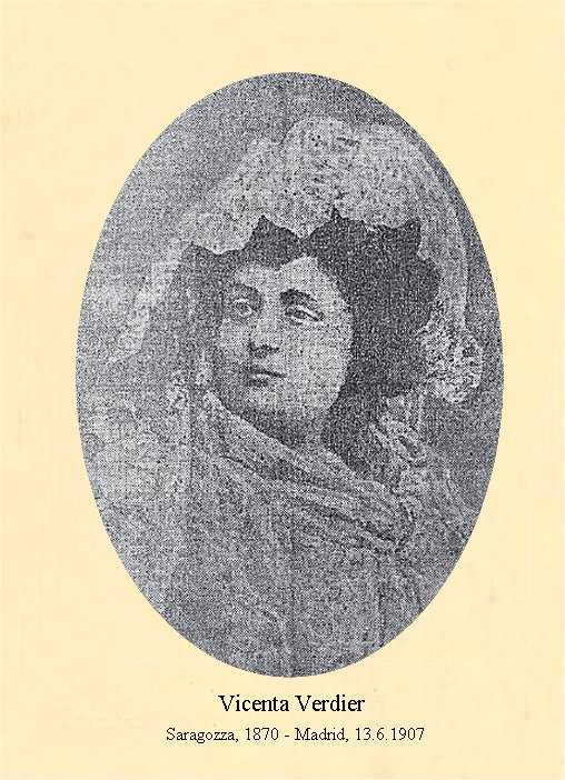 Ritratto di Vicenta Verdier (1870-1907) la vittima del "Crimen de la calle de los Tudescos " di Madrid il 13.6.1907 - caso poliziesco rimasto fino ad oggi irrisolto.